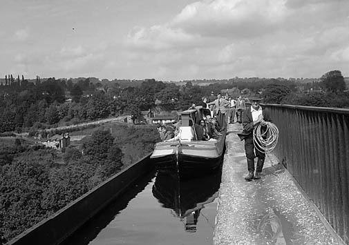 Teitl Cymraeg/Welsh title: Cychod ar Afon Dyfrydwy a Chamlas Llangollen Ffotograffydd/Photographer: Geoff Charles (1909-2002) Dyddiad/Date: 14/9/1956 Cyfrwng/Medium: Negydd ffilm / Film negative Cyfeiriad/Reference: (gch12970) Rhif cofnod / Record no.: 3369334 Rhagor o wybodaeth am gasgliad Geoff Charles yn Llyfrgell Genedlaethol Cymru More information about the Geoff Charles Collection at the National Library of Wales Mae ffotograffau Geoff Charles hefyd yn rhan o Broject Europeana Libraries Geoff Charles' photographs also form part of the Europeana Libraries Project